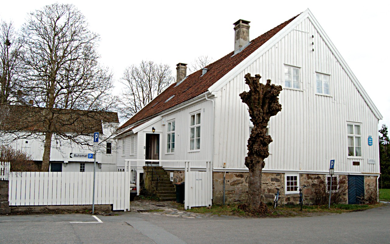 Tidemandgården i Mandal